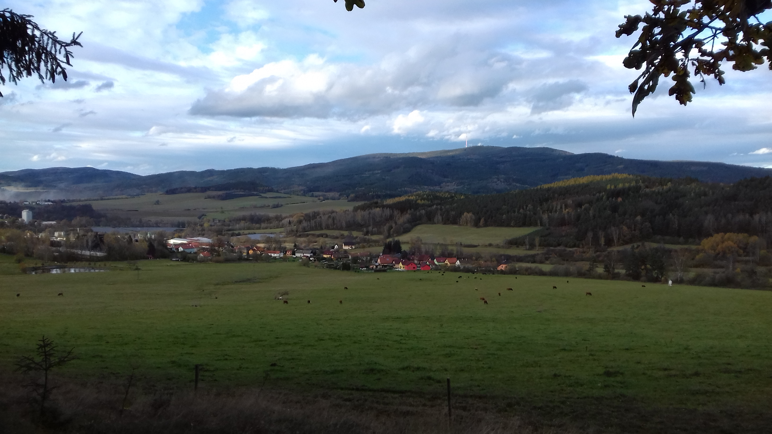 Kladné od Záhorkova